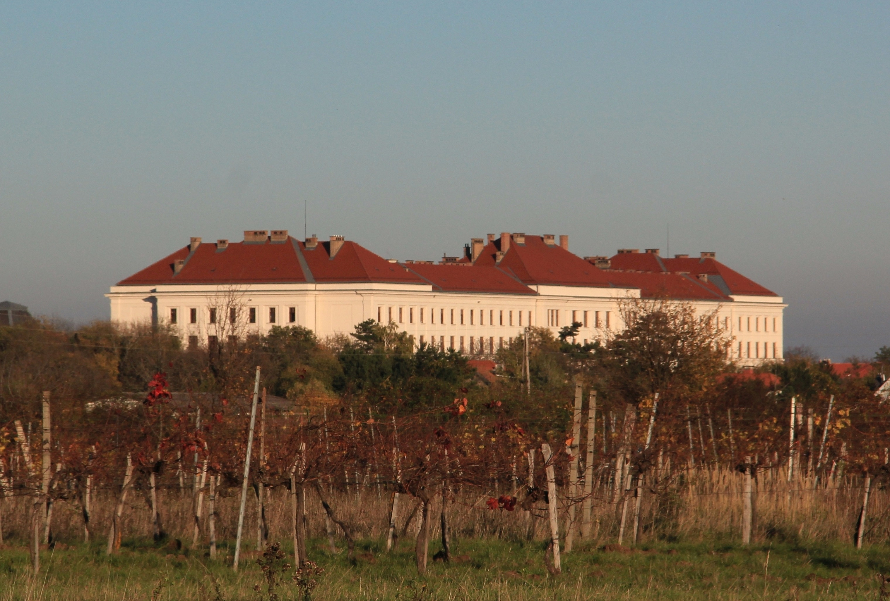 Erstaufnahmelager Traiskirchen